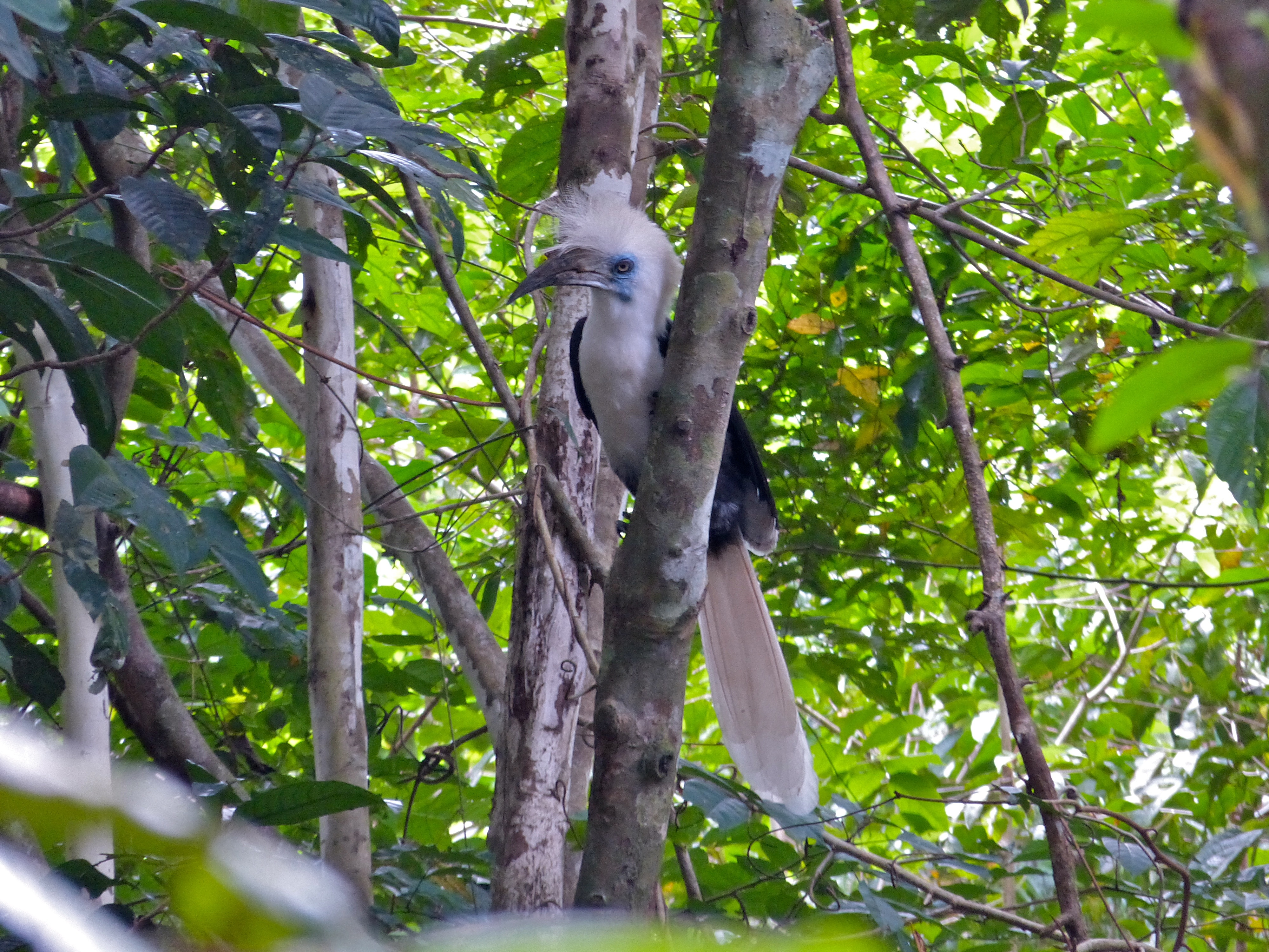 Uncle Tan's Jungle Camp, Kinabatangan River, Sabah, MALAYSIA